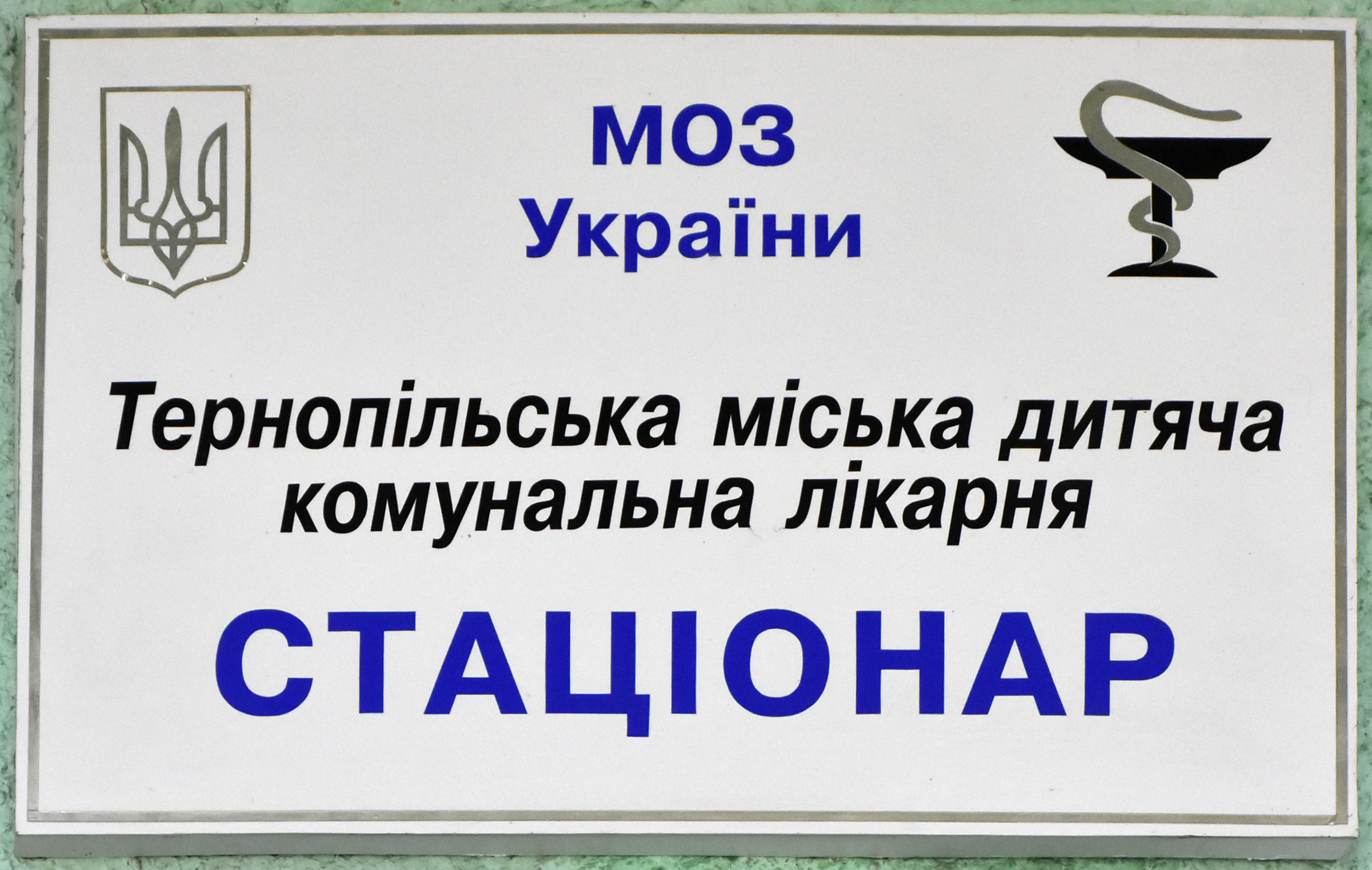 Вивіска: «Тернопільська міська дитяча комунальна лікарня. Адміністрація».